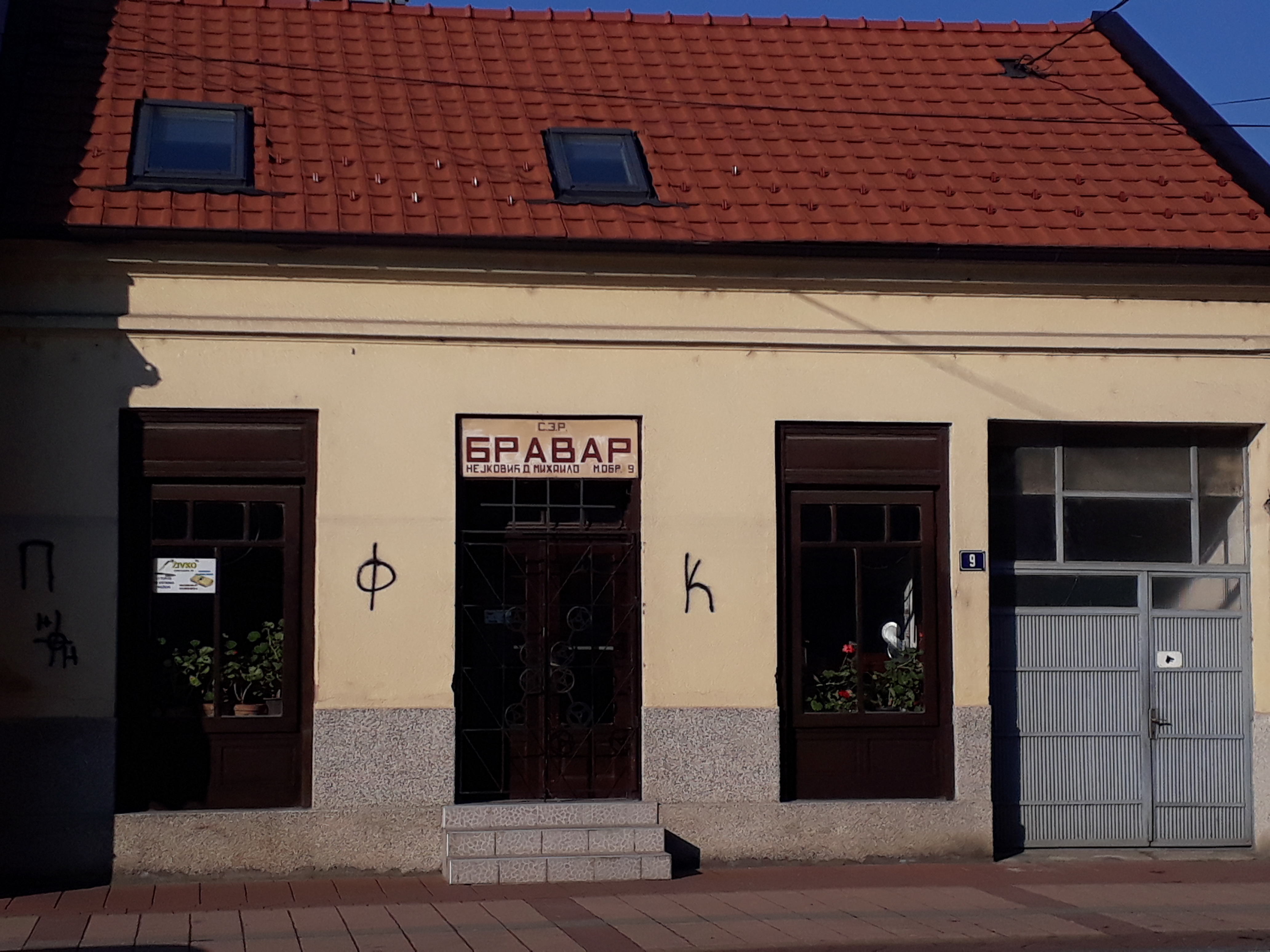 Jedna od prvih zanatskih radnji u Obrenovcu